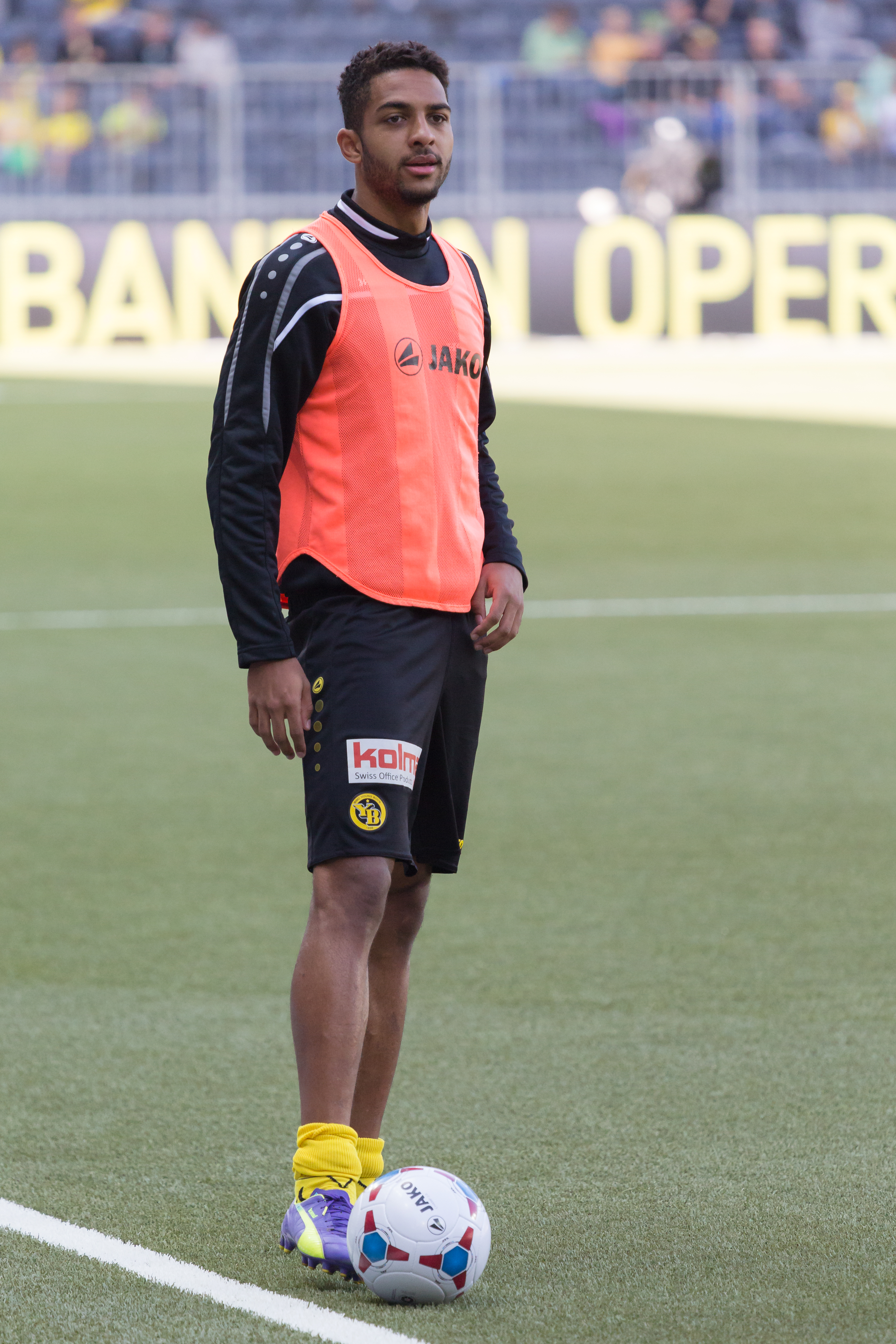 Gregory Wüthrich beim Spiel des BSC Young Boys gegen den FC Luzern